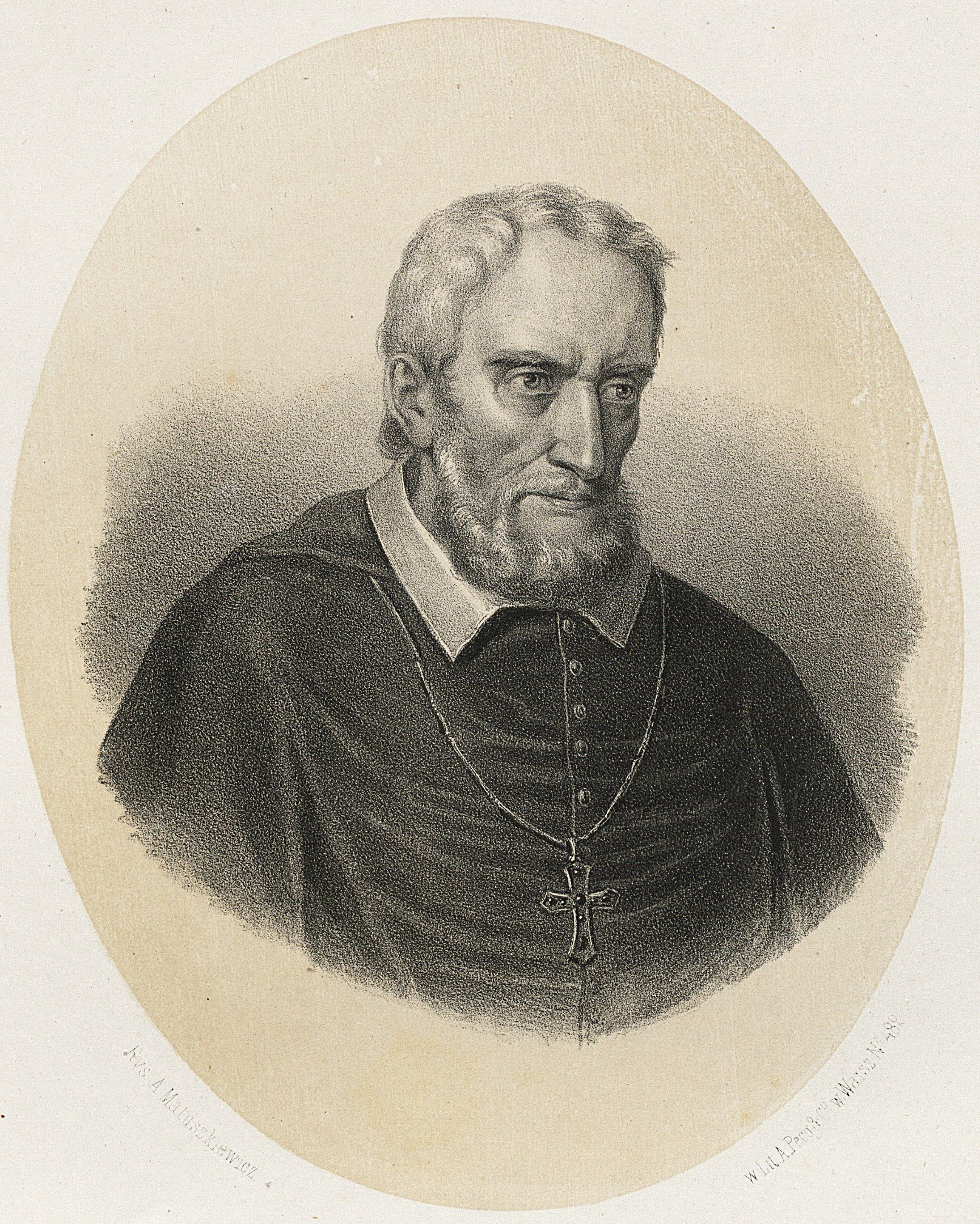 Janik (Jaksa) Gryfita (zm. po 1167), arcybiskup gnieźnieński, biskup wrocławski